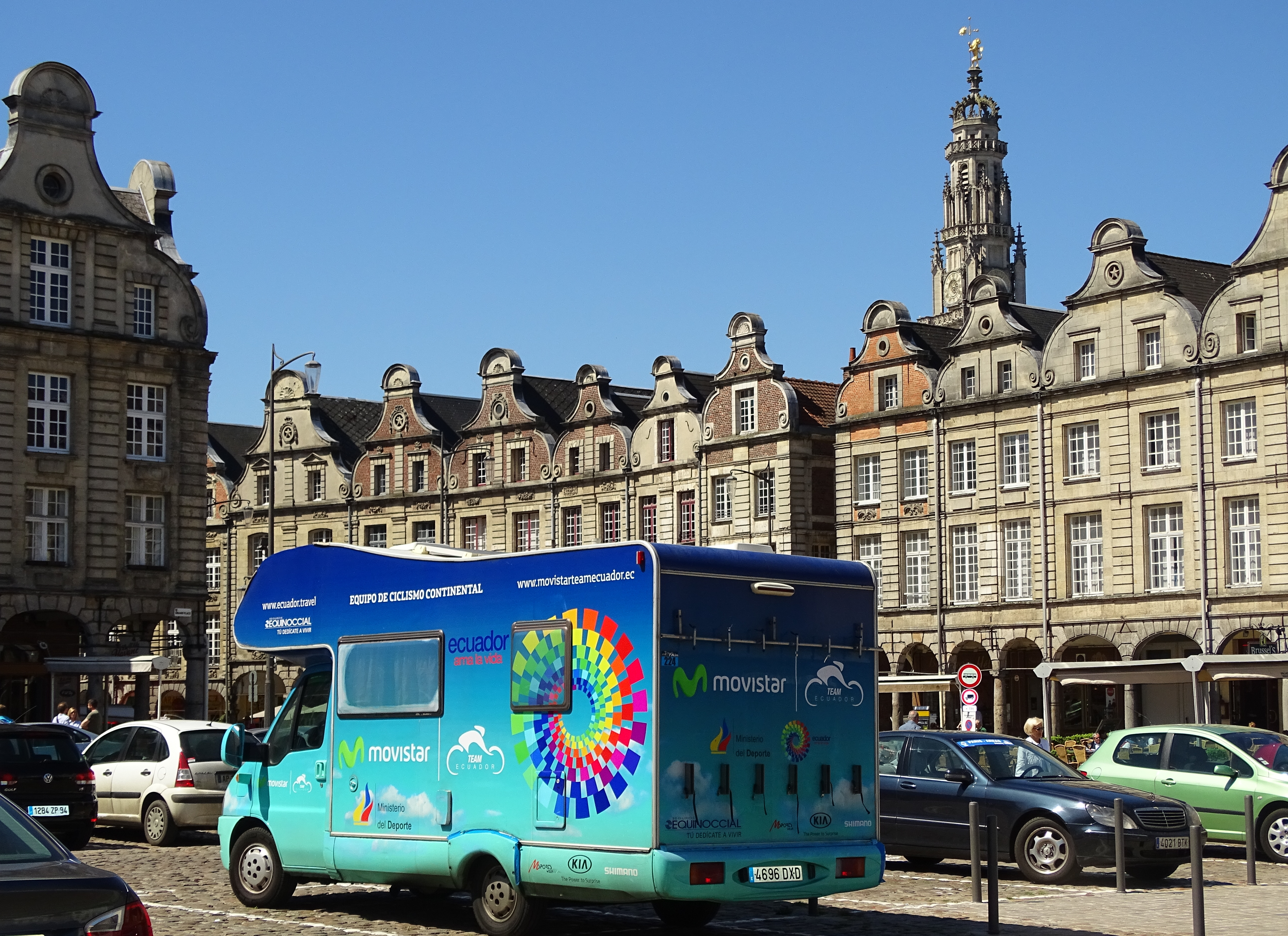 Reportage réalisé le dimanche 24 mai 2015 à l'occasion du départ et de l'arrivée de la troisième étape du Paris-Arras Tour 2015 à Arras, Pas-de-Calais, Nord-Pas-de-Calais, France.